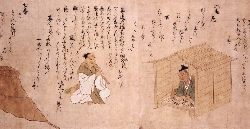 『三十二番職人歌合』、垂恵 (?)、1494年